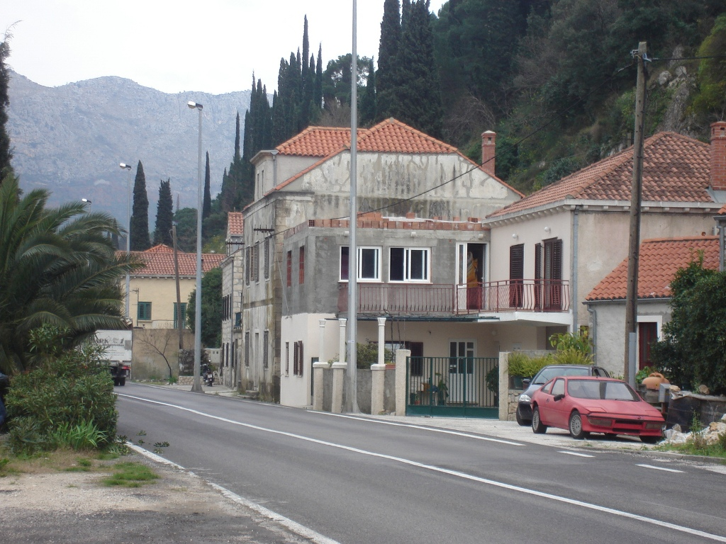 Village Čajkovići near Dubrovnik